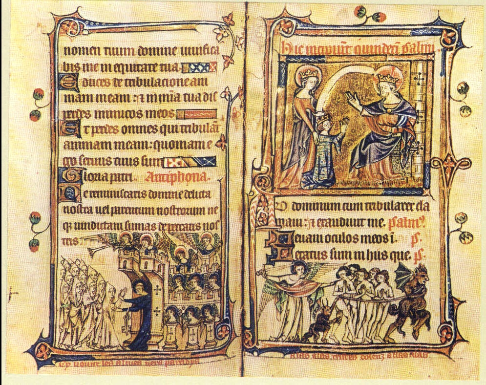 Miniaturen Eigentümer vor dem Thron Christi, Himmel und Hölle, aus dem